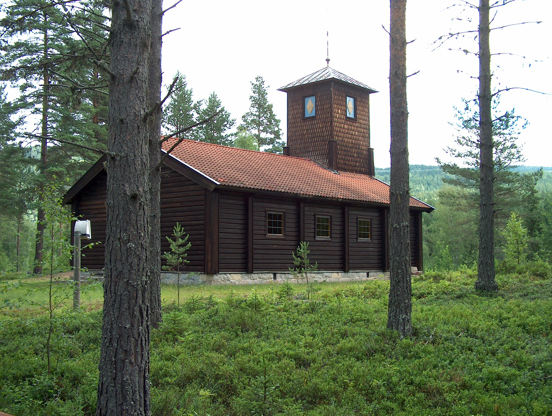 Strømsoddbygda kapell (sør)